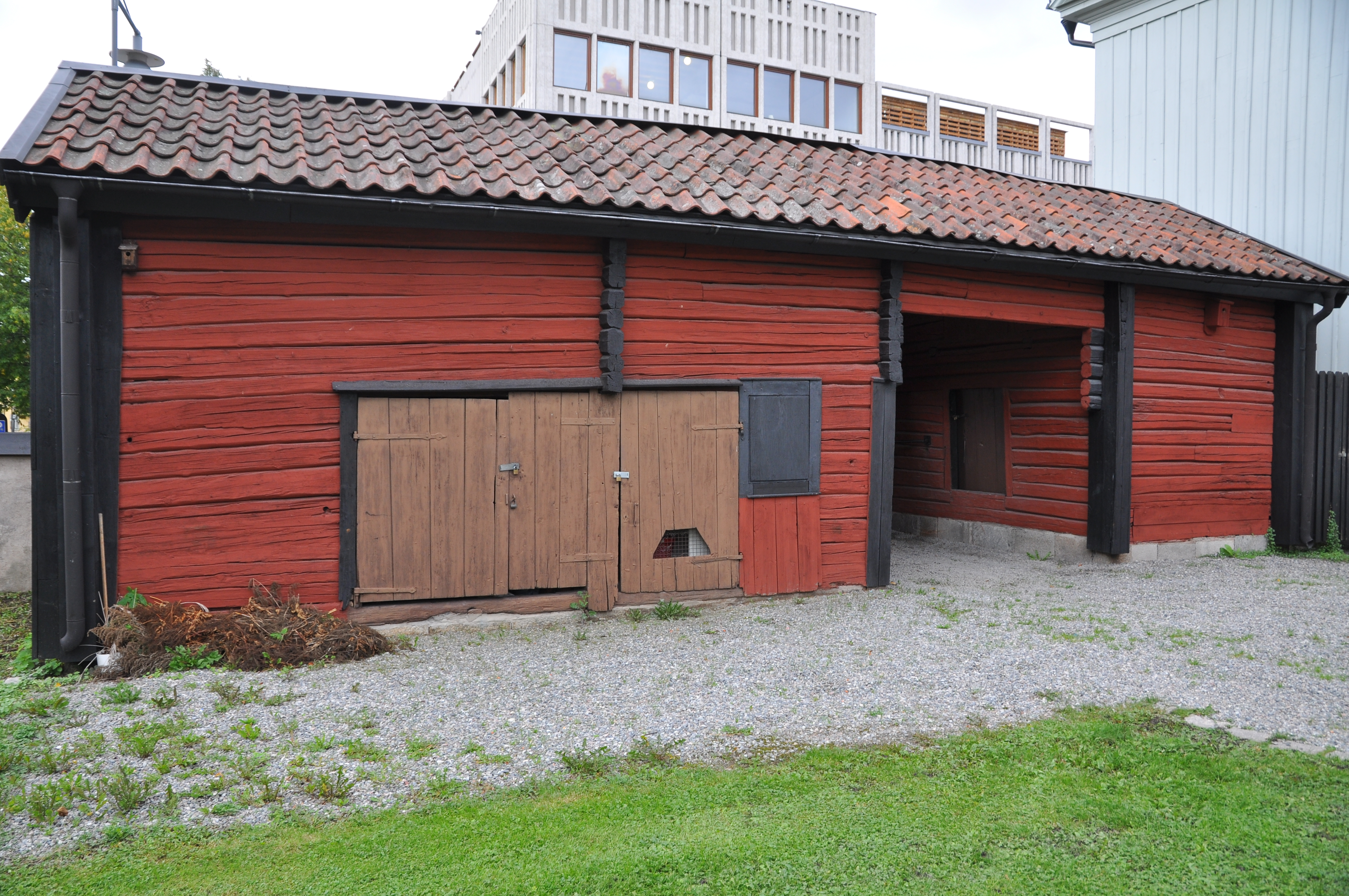 Västerås Komministergården. Portlidret sett från väster (gårdssidan).